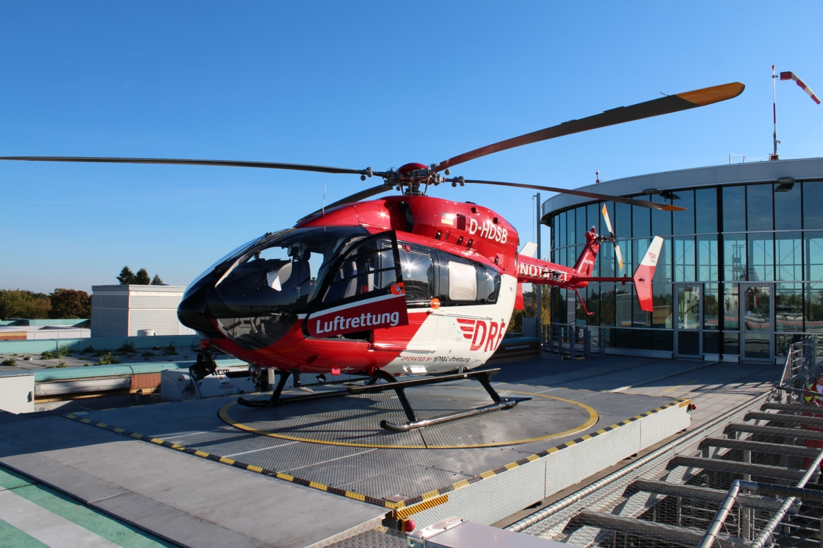 Christoph Berlin (D-HDSB) auf dem Dach des Unfallkrankenhauses Berlin.